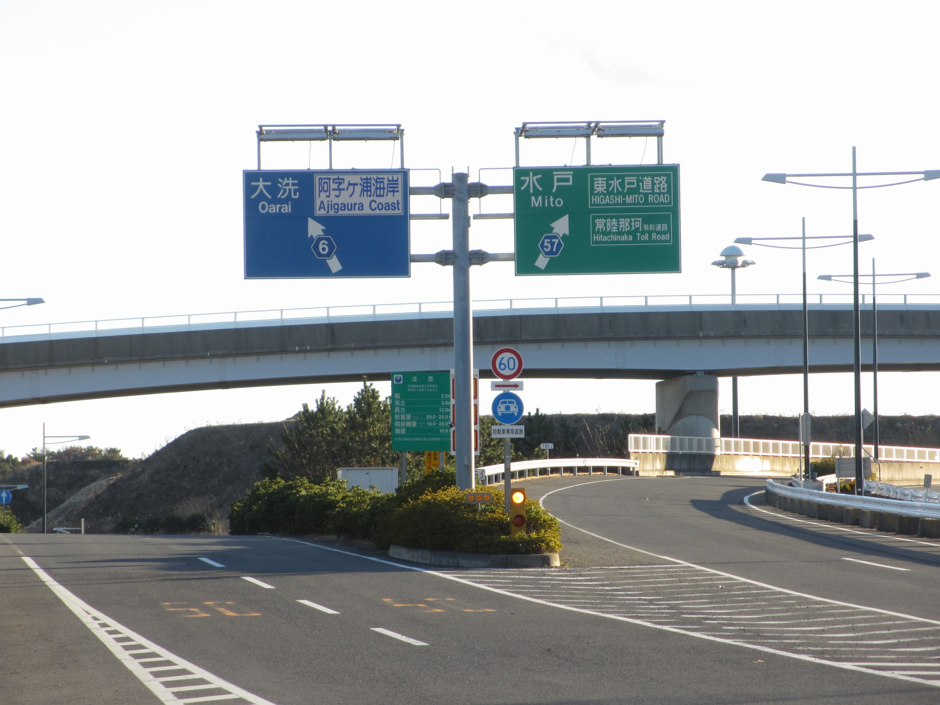 常陸那珂港インターチェンジ入口（北側から）